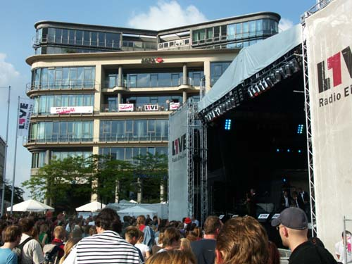 Ringfest 2004 am Mediapark in Köln